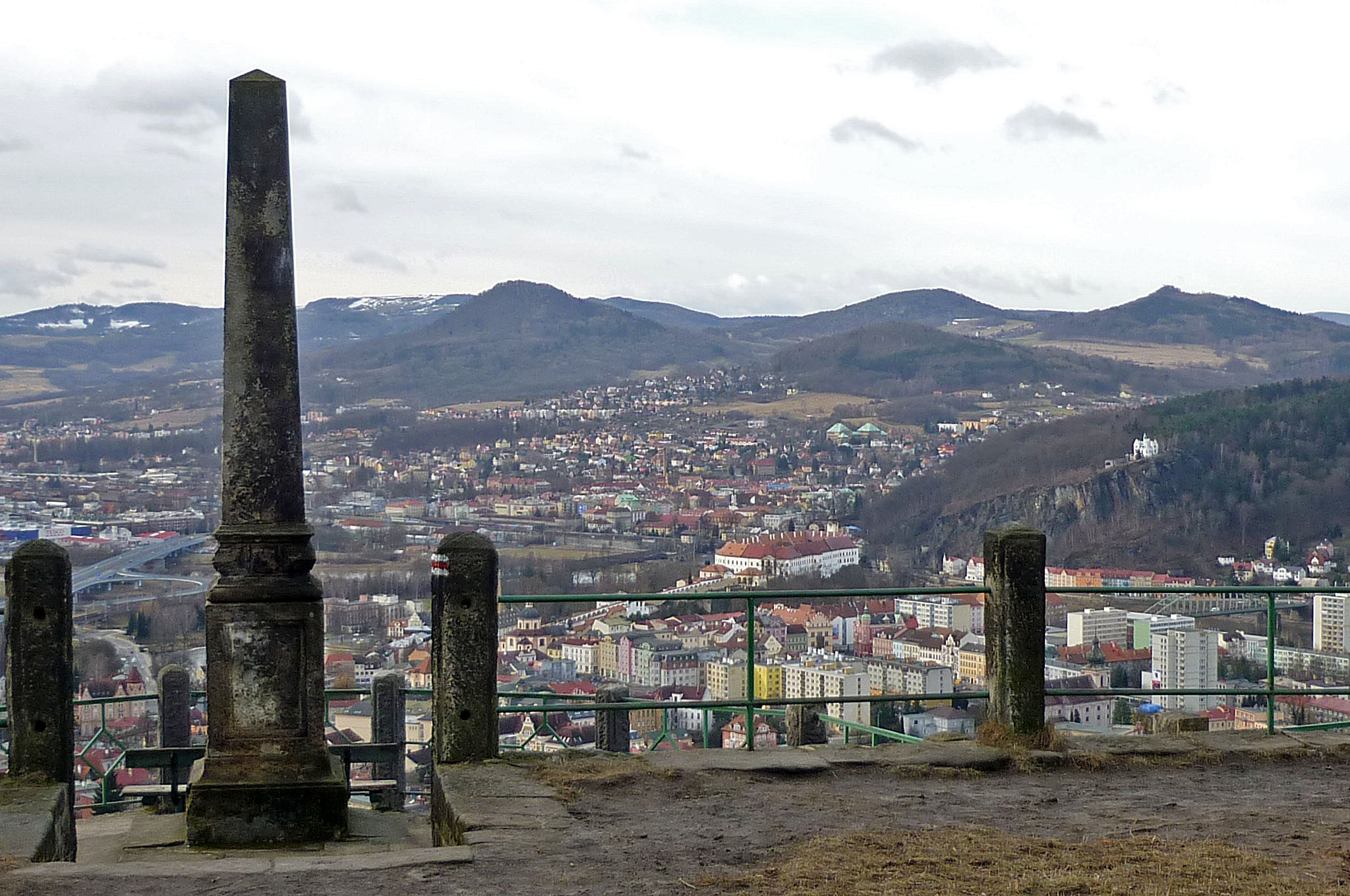 Sandsteinsäule auf der Leopoldshöhe (Kaiseraussicht) bei Tetschen in Böhmen